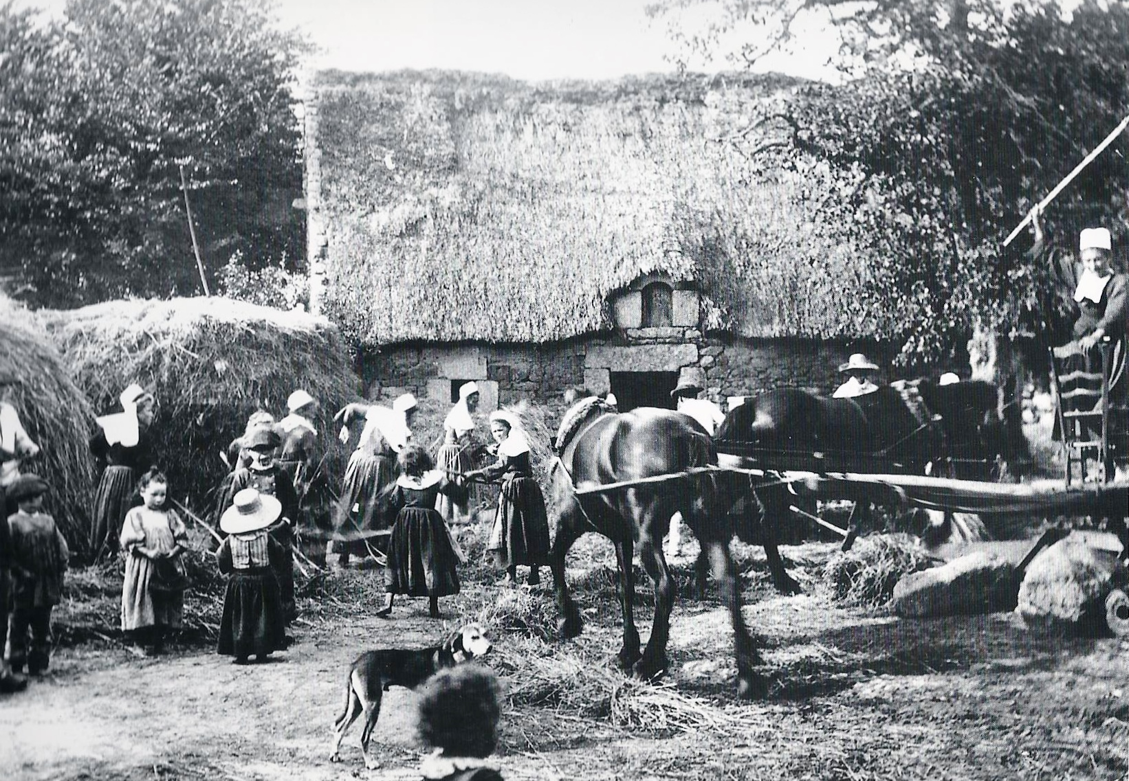 Battage au manège à Port-Manech vers la fin du XIXe siècle (photographie auteur inconnu)